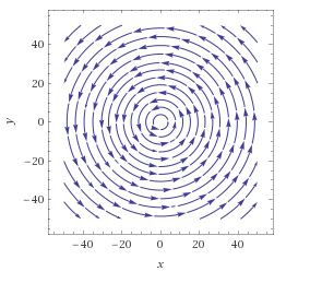 Ilustração do campo vetorial F(x,y)= -yi +xj